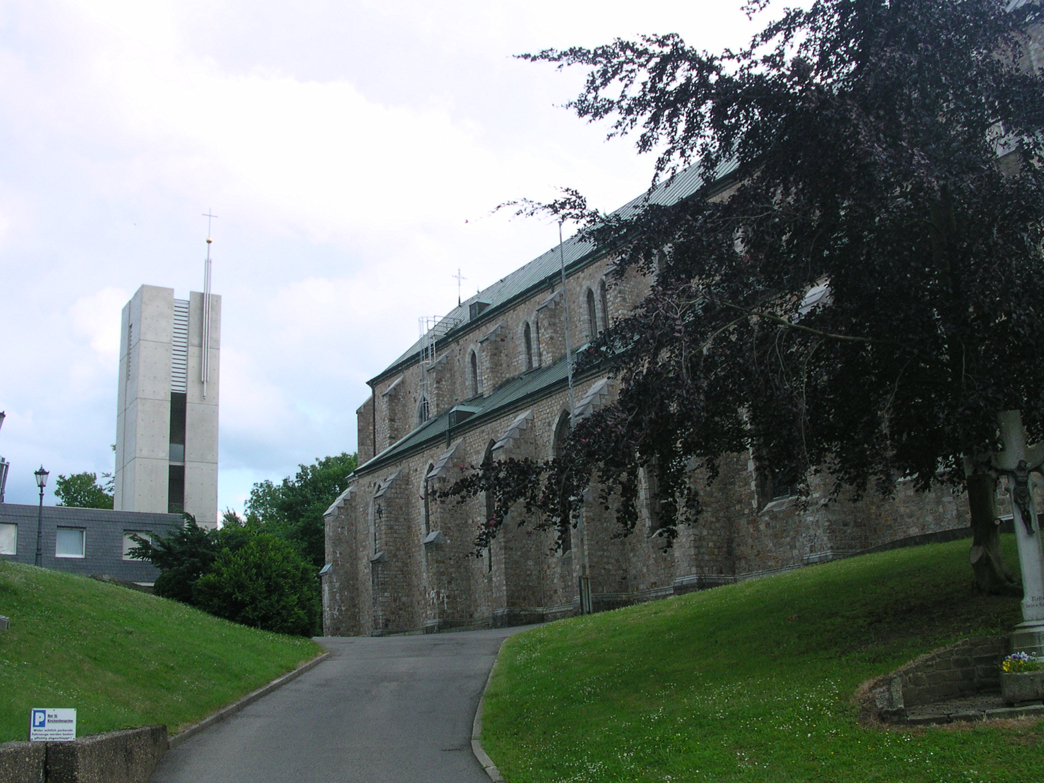 Stolberg-Büsbach, Hubertuskirche nach Abriß des gotischen Turms